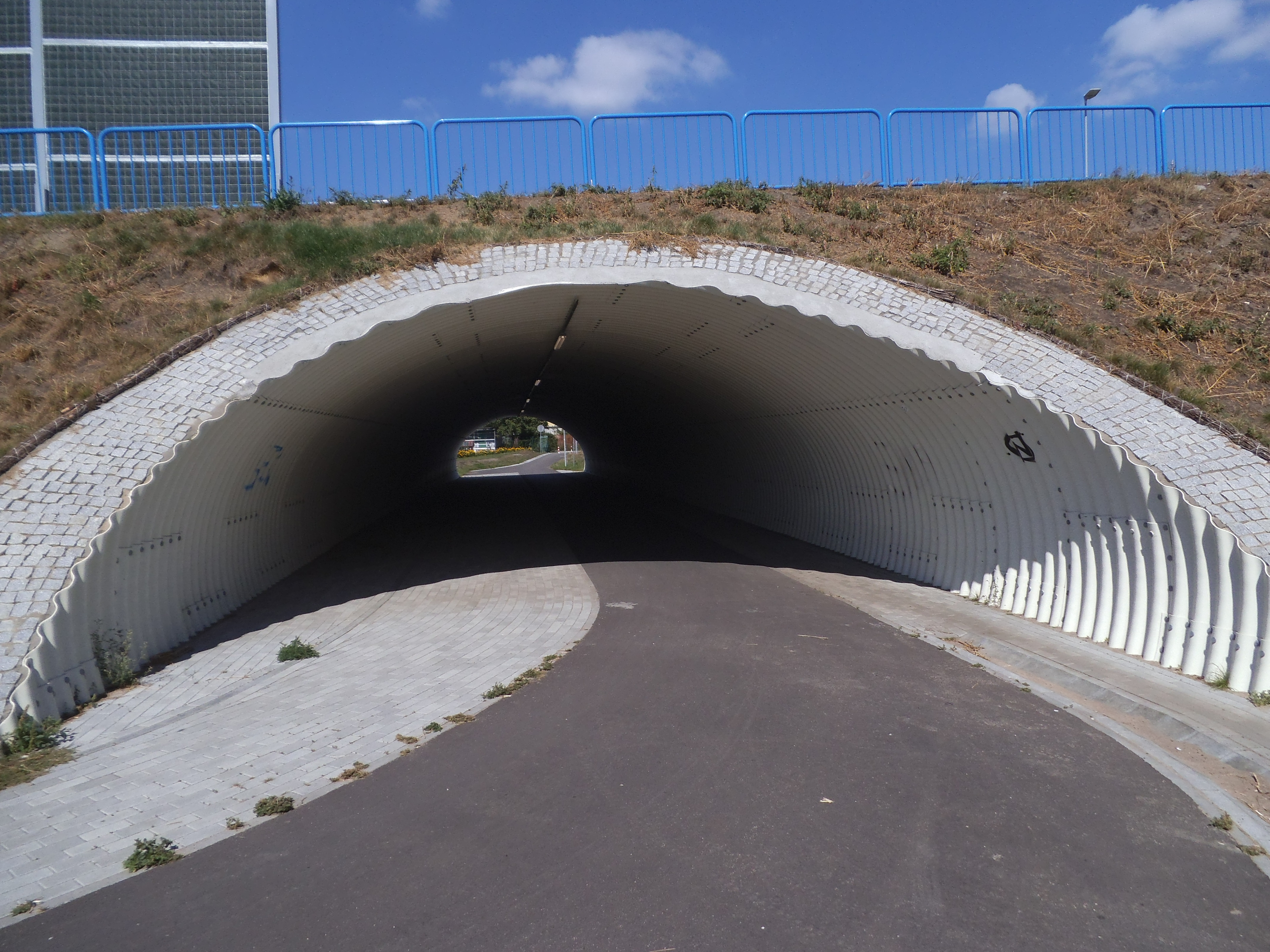 Tunel dla pieszych pod Trasą Średnicową Północną w Toruniu